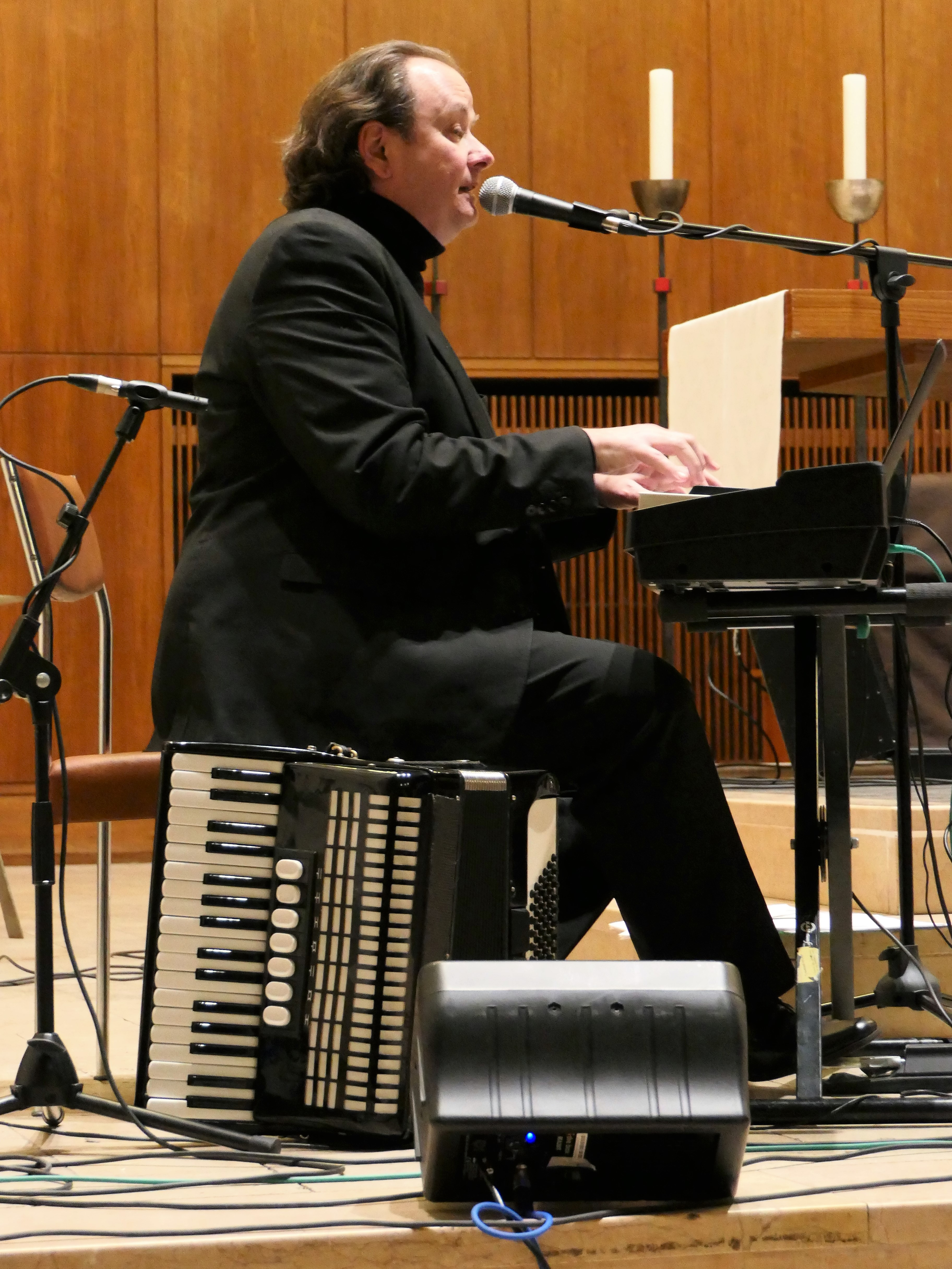 Jazzmusiker Alexander Hopff während eines Auftritts der Klezmer-Band Mischpoke in Dresden am 9. März 2018